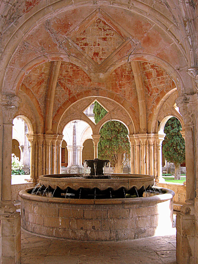 Fuente del patio central del monasterio de Poblet. Near Montblanc - Tarragona - Spain.